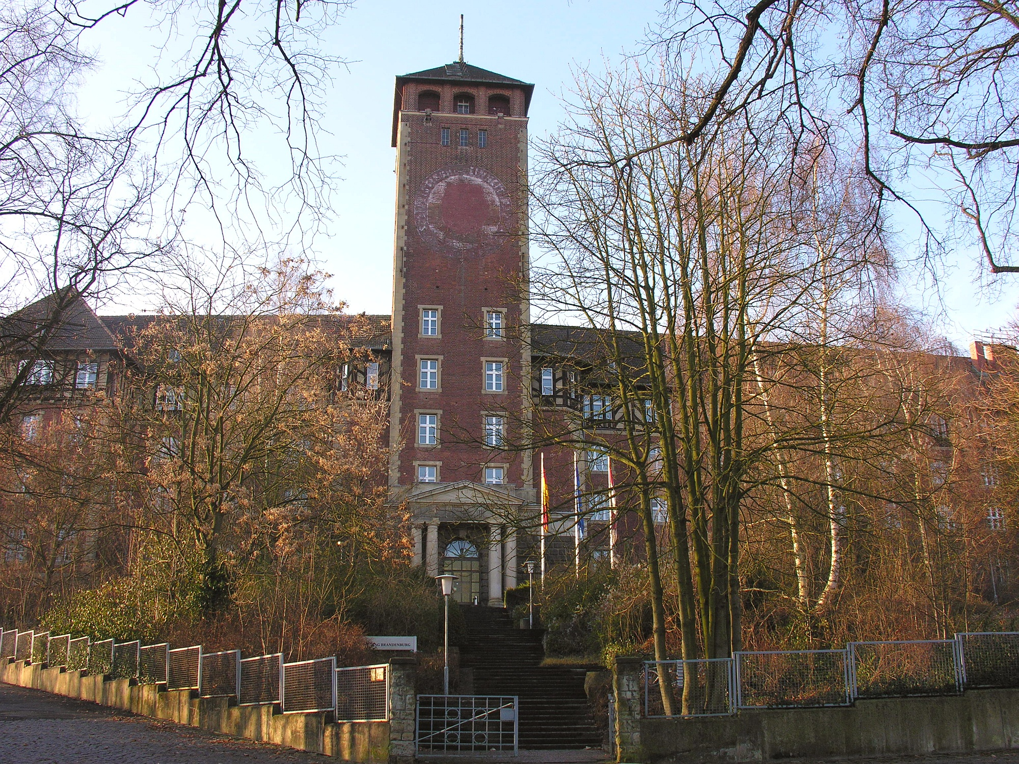 Die „Reichskriegsschule“ auf dem Brauhausberg in Potsdam wurde 1902 erbaut, von 1919 bis 1945 Sitz des Reichsarchivs bzw. des Heeresarchivs. Von 1948 bis 1990 war hier die SED-Bezirks- und Kreisleitung Potsdam untergebracht, von 1991 bis 2013 der Brandenburgische Landtag.